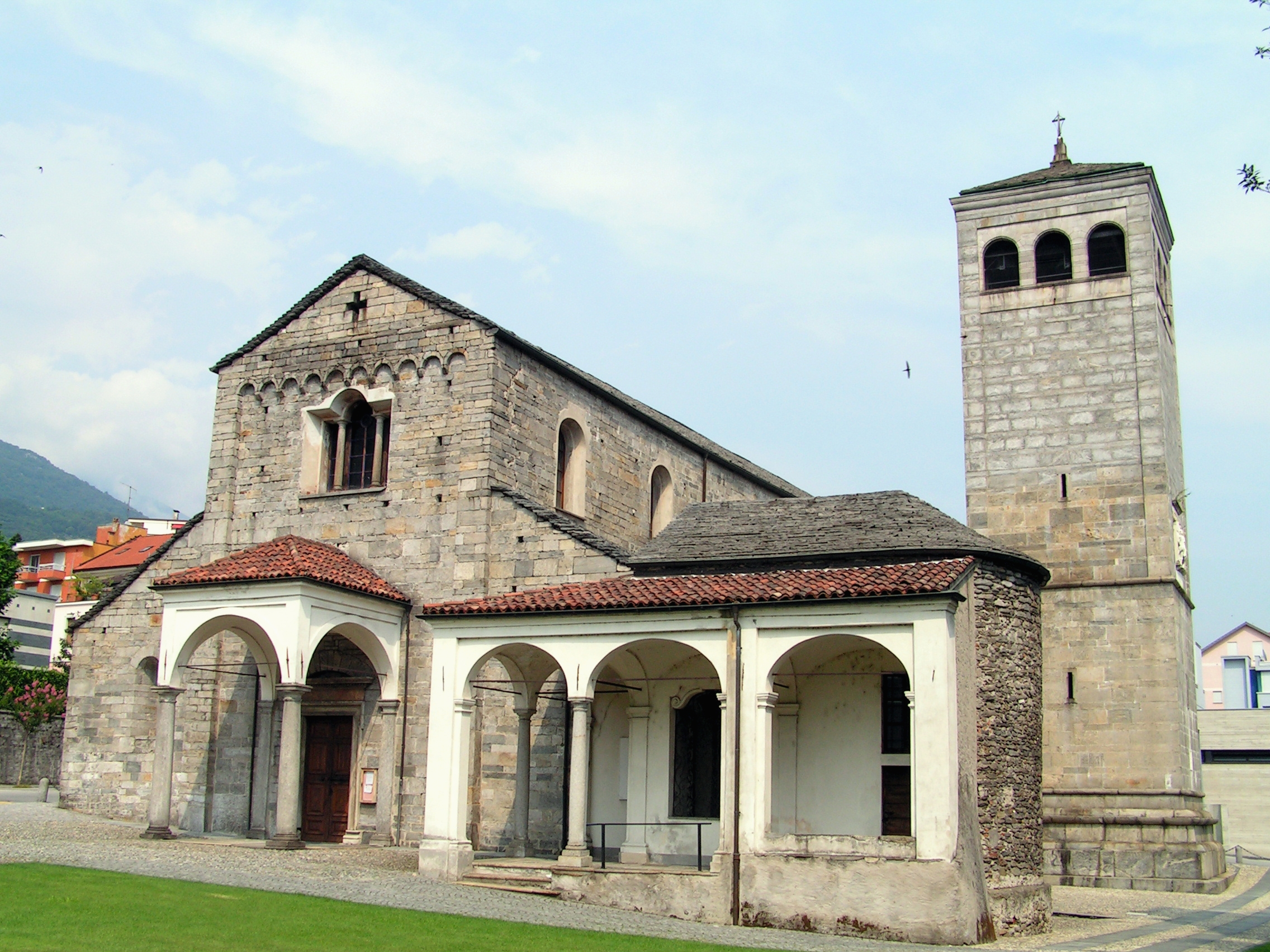 Via San Vittore, Muralto. Église San Vittore.